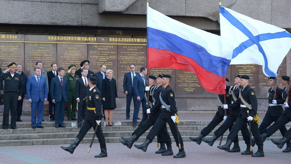 После возложения цветов к мемориалу героической обороны Севастополя